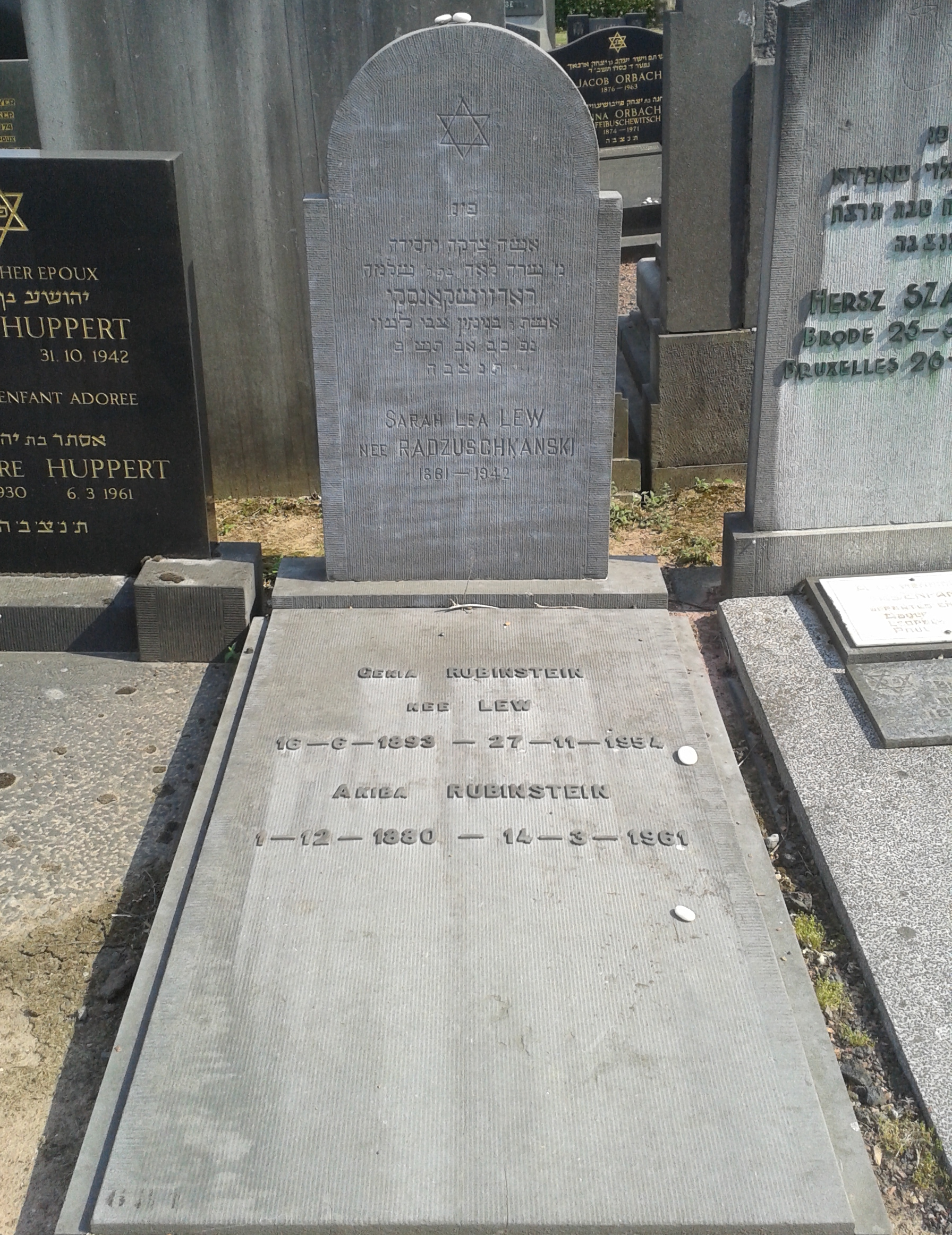 Akiba Rubinstein - grób rodzinny na cmentarzu w Wezembeek-Oppem